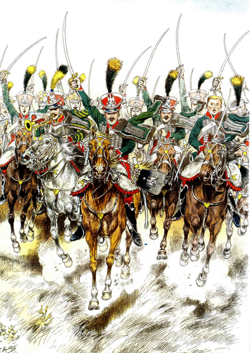 Le 3e régiment de gardes d'honneur à la charge. Les cavaliers sont ici en grande tenue.